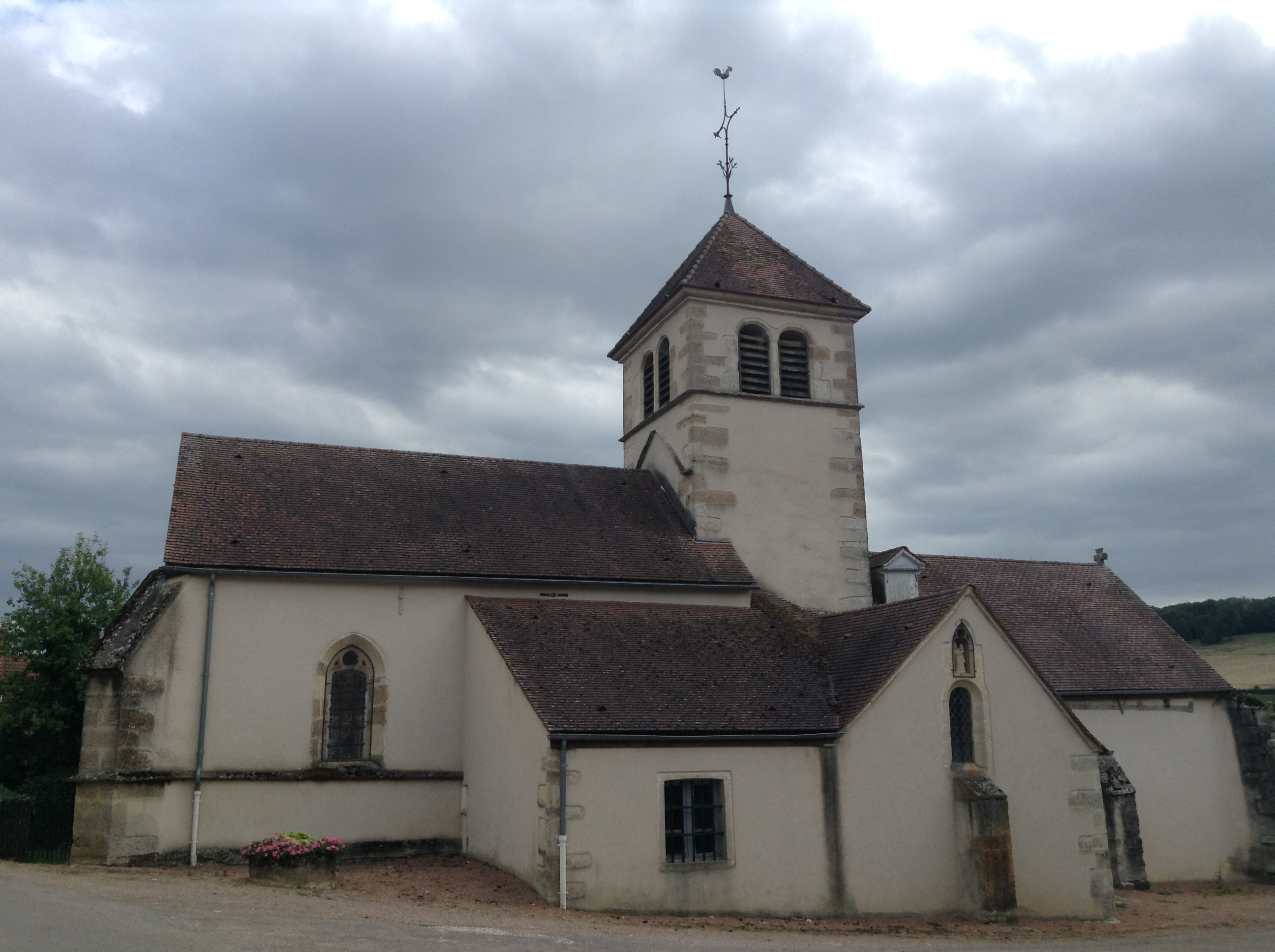 L'église Sainte Marguerite de Beurey-Bauguay, au centre du village